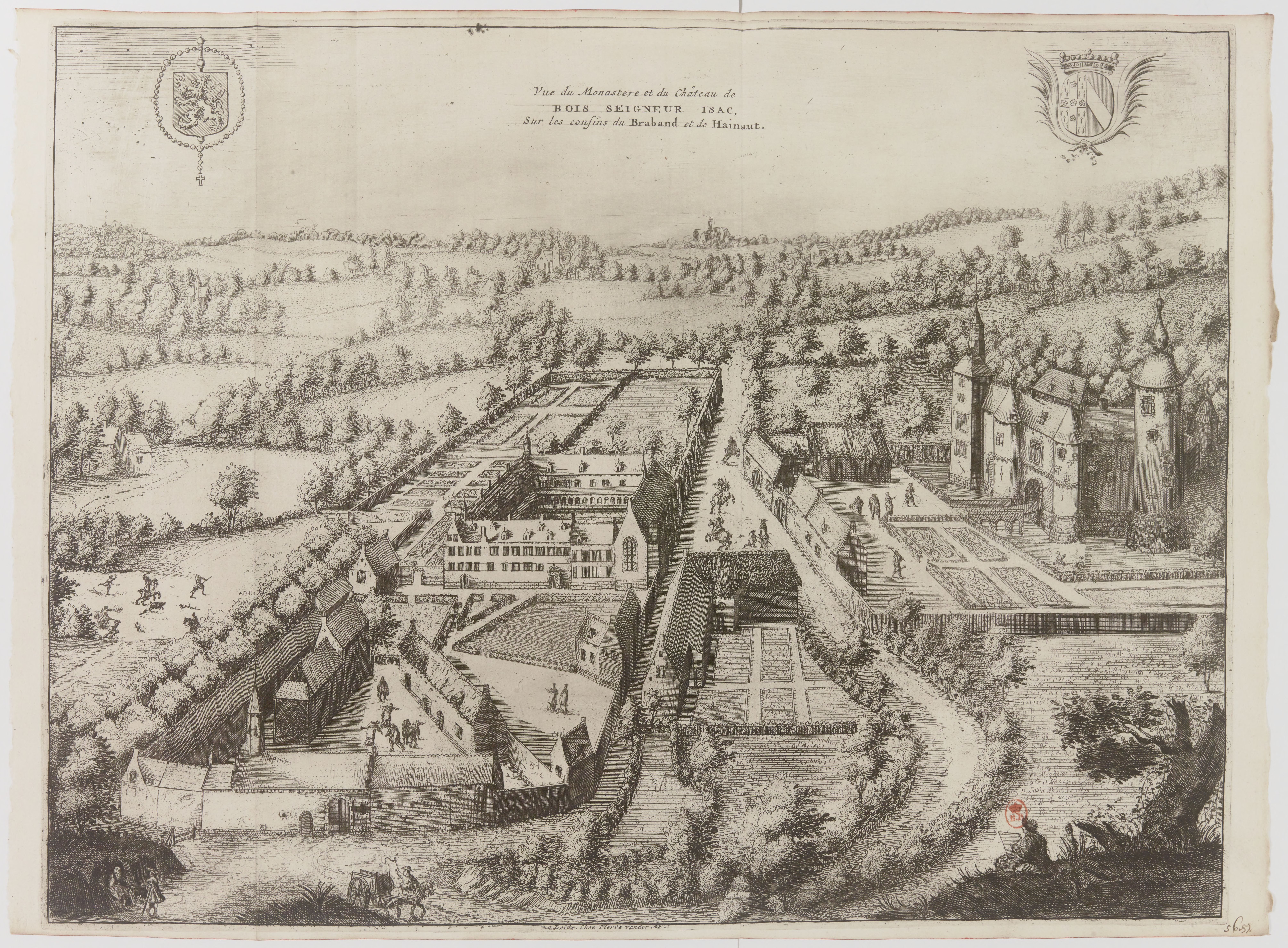 La galerie agréable du monde, où l'on voit en un grand nombre de cartes très exactes et de belles tailles douces les principaux empires, roïaumes, républiques, provinces, villes, bourgs et forteresses ...les îles, côtes rivières, ports de mer...les antiquitez, les abbayes, églises, académies...comme aussi les maisons de campagne, les habillemens et moeurs des peuples...dans les quatre parties de l'univers. Divisée en LXVI tomes, les estampes aiant été dessinées sur les lieux et gravées exactement par les célèbres Luyken, Mulder, Goerée, Baptist, Stopendaal et par d'autres maîtres renomez.... Tome troisième des Païs-Bas catholiques, ou X provinces